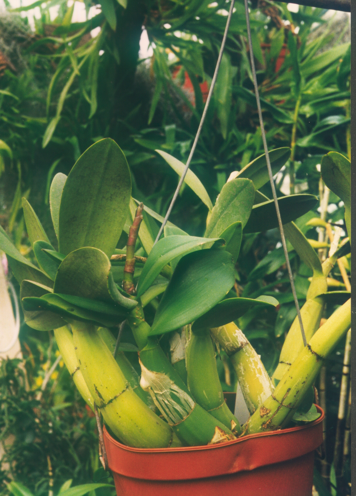 Schomburgkia undulata